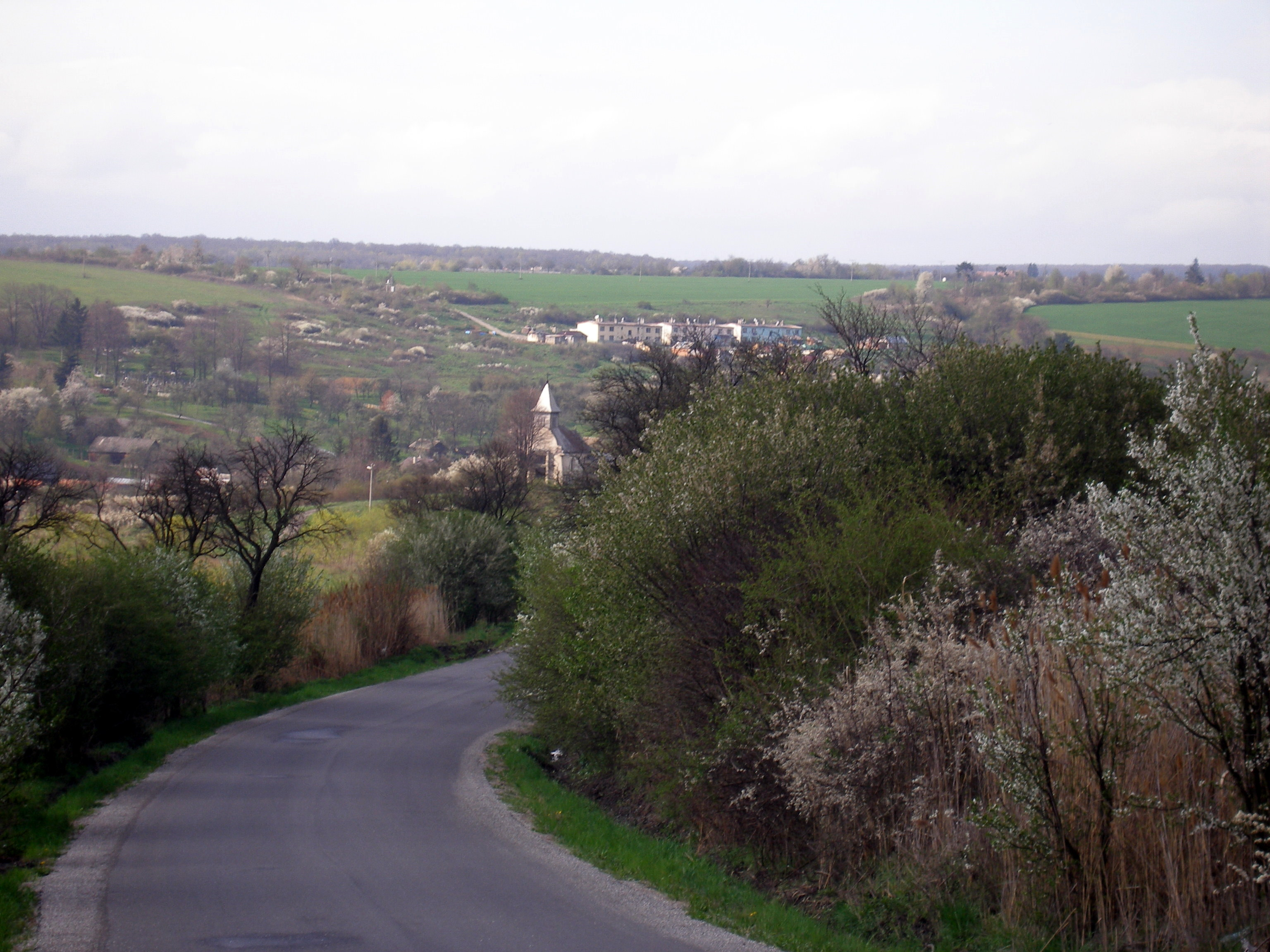 Obec Mirkovce okres Prešov región Šariš